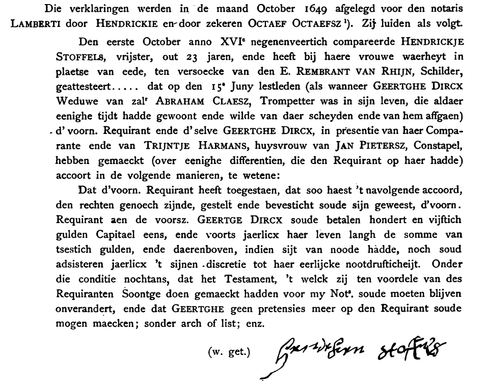 Facsimile akte met handtekening Hendrickje Stoffels, uit digitalisering boek Oud Holland, Geschiedenis der Neder landsche Kunst, Letterkunde, Nijverheid, 1885